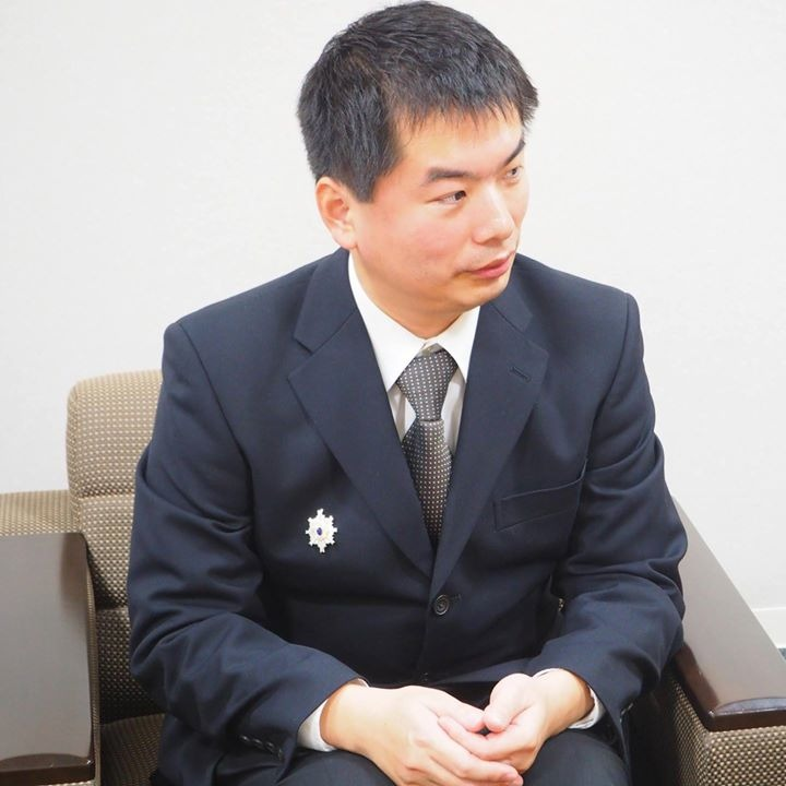 下関市長に表敬訪問中